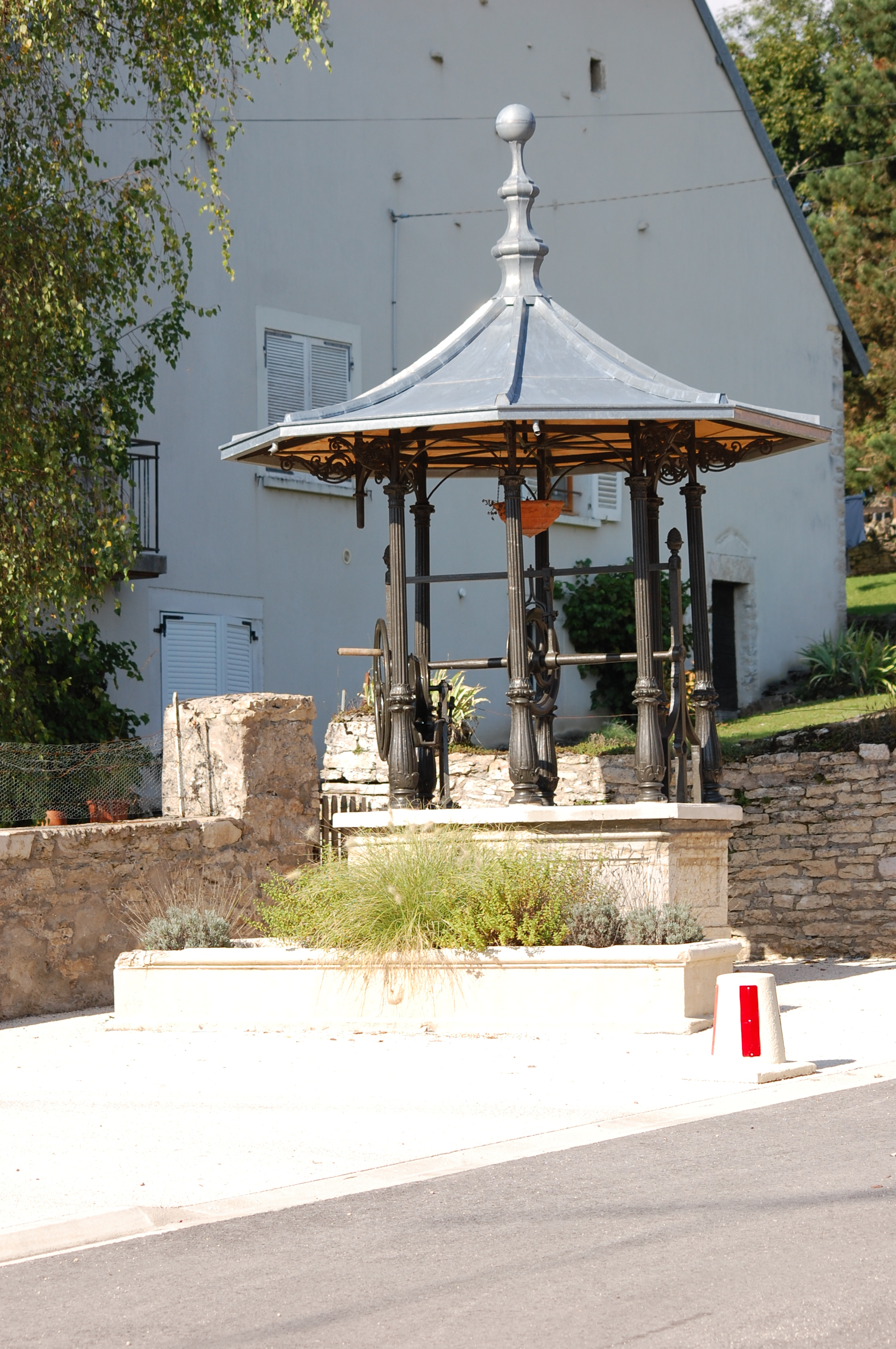 Puits